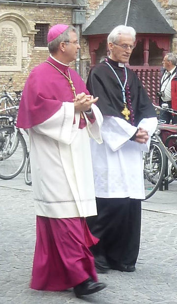 Bloedprocessie AD2014, Brugge